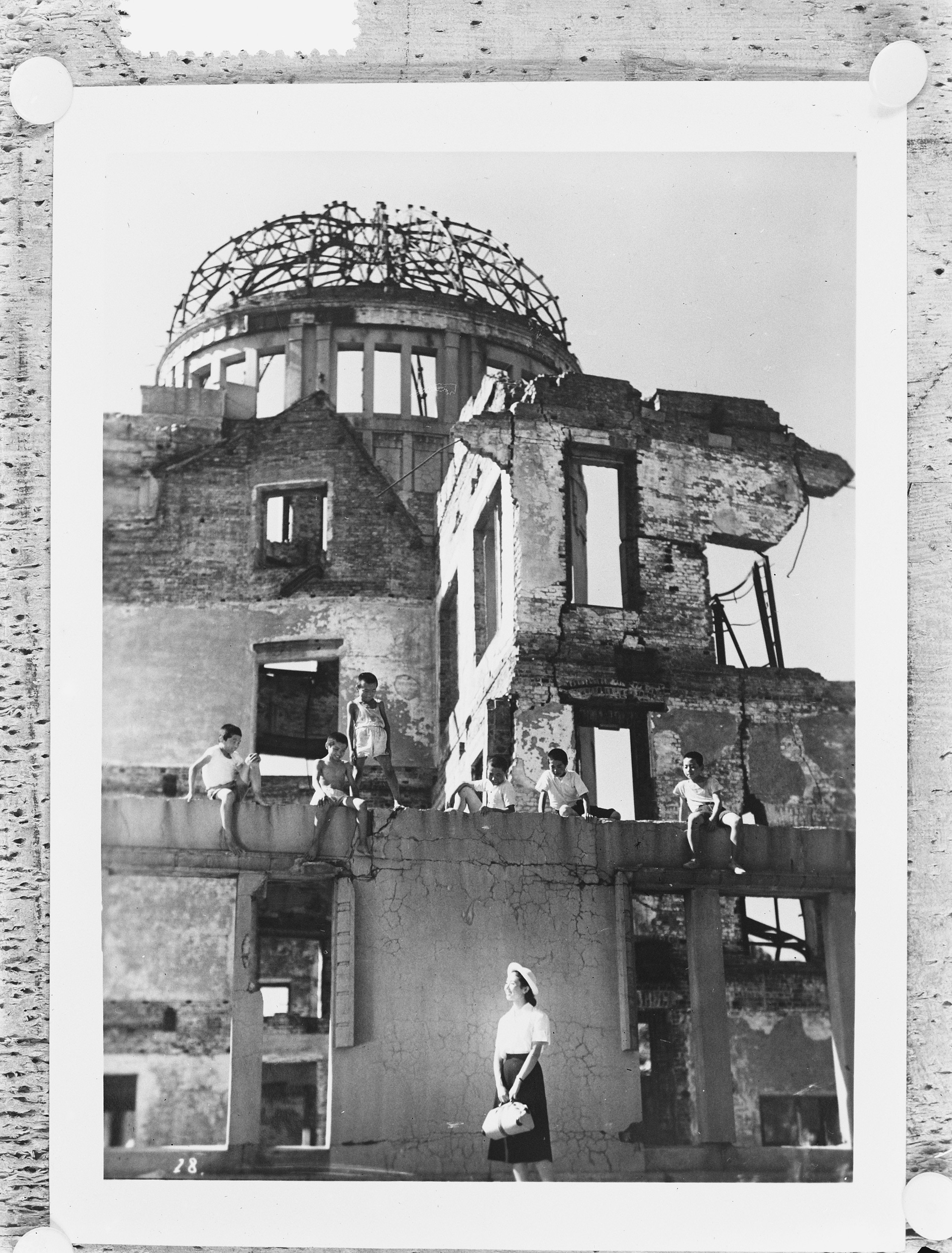 Collectie / Archief : Fotocollectie Anefo Reportage / Serie : [ onbekend ] Beschrijving : Reprodukties Hiroschima (Royal Film) Datum : 4 maart 1954 Locatie : Hiroshima Trefwoorden : FILM, Reprodukties Persoonsnaam : ROYAL Fotograaf : Doka / Anefo Auteursrechthebbende : Nationaal Archief Materiaalsoort : Glasnegatief Nummer archiefinventaris : bekijk toegang 2.24.01.09 Bestanddeelnummer : 906-3249